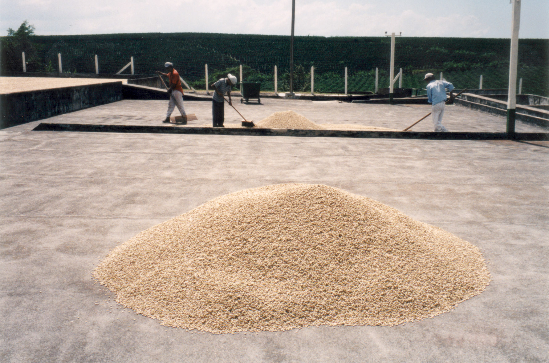 Secado de café al Sol en una plantación de Costa Rica Coffee Patio Dried